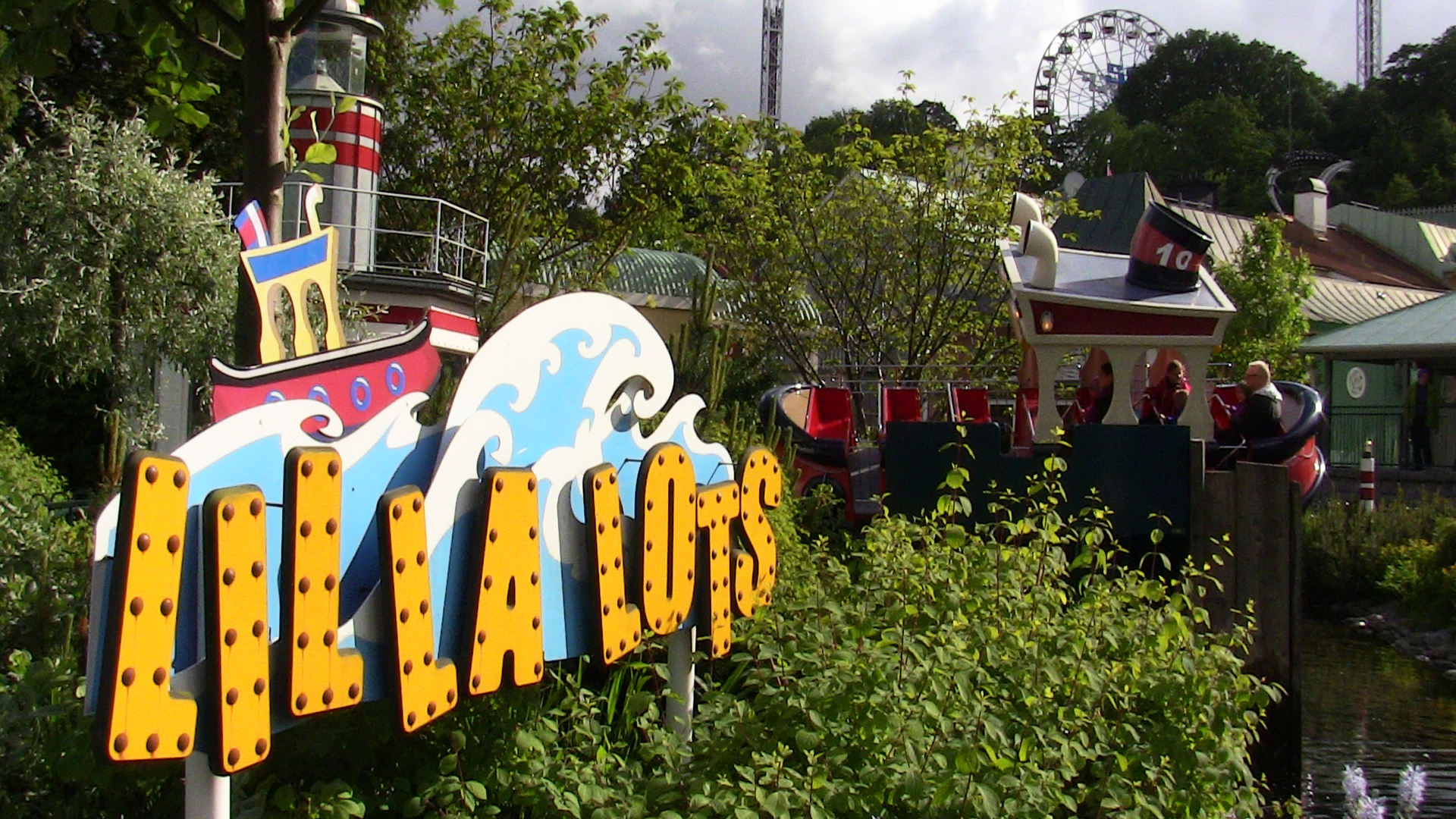 Lilla Lots, Liseberg